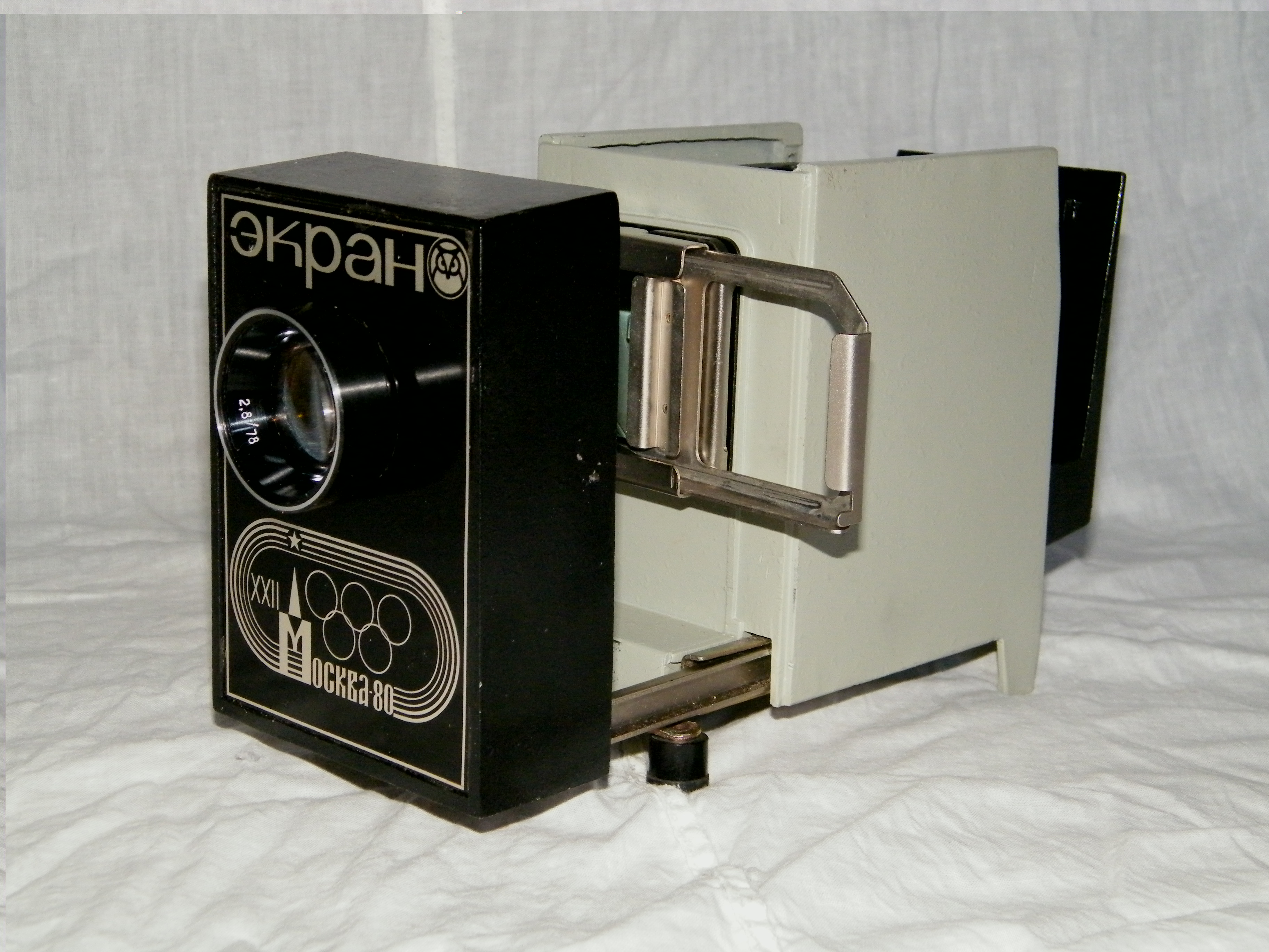 Slide projector Ekran, USSR, 1979